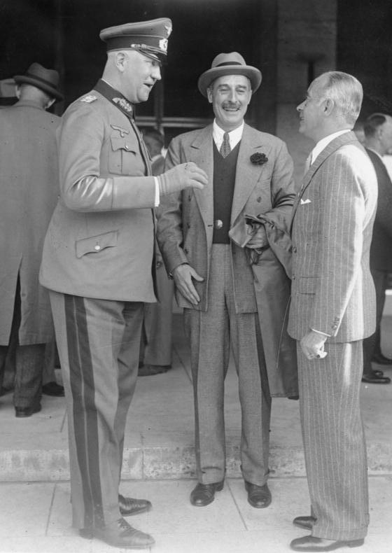 Vor Fußball-Länderspiel Deutschland - England Scherl: Das größte fussballsportliche Ereignis des Jahres im Bildbericht: UBz.: den Reichssportführer von Tschammer und Osten (rechts) in der grossen Ehrenloge vor Beginn des Fussball-Länderkampfes Deutschland-England im Gespräch mit dem britischen Botschafter in Berlin Henderson (Mitte) und Generalleutnant Fromm. Scherl Bilderdienst 14.5.1938 6475-38 [Berlin] Abgebildete Personen: Henderson, Neville: Botschafter in Argentinien, Botschafter in Deutschland, Großbritannien Fromm, Friedrich: Generaloberst, Ritterkreuz (RK), Heer, Deutschland (GND 118843338) Tschammer und Osten, Hans von: Reichssportführer, Präsident des Deutschen Olympischen Ausschusses, Deutscher Reichsbund für Leibesübungen, Deutschland (GND 117431257)